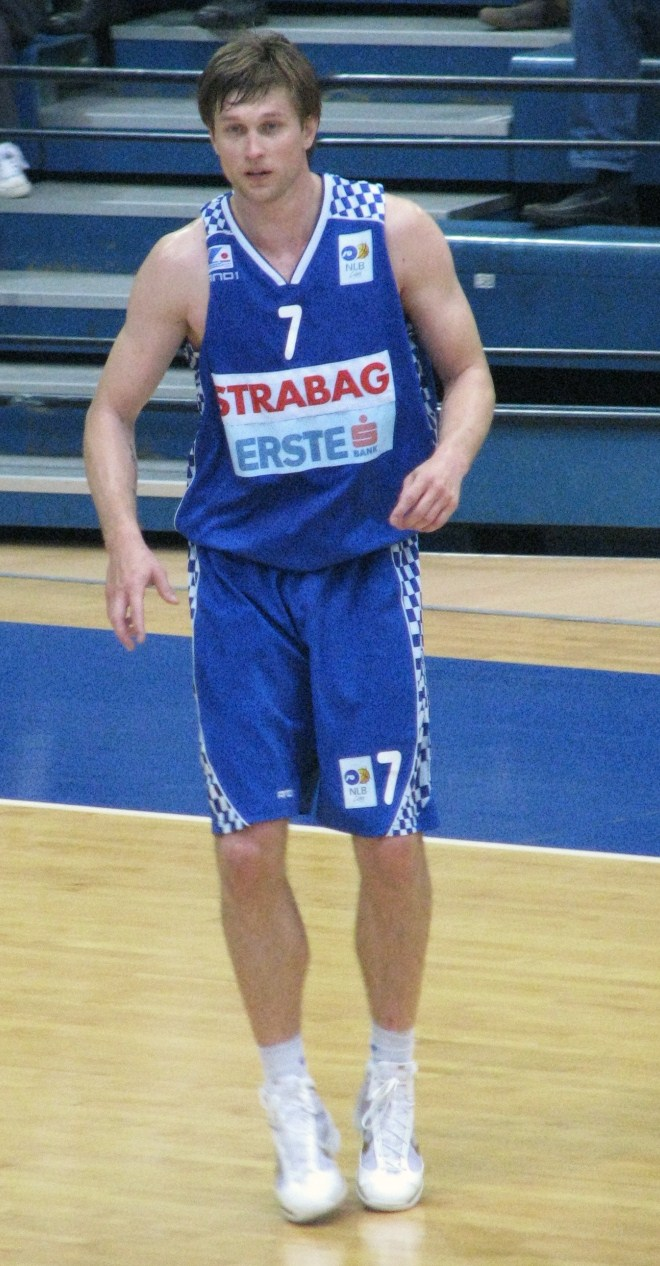 Vladimer Boisa